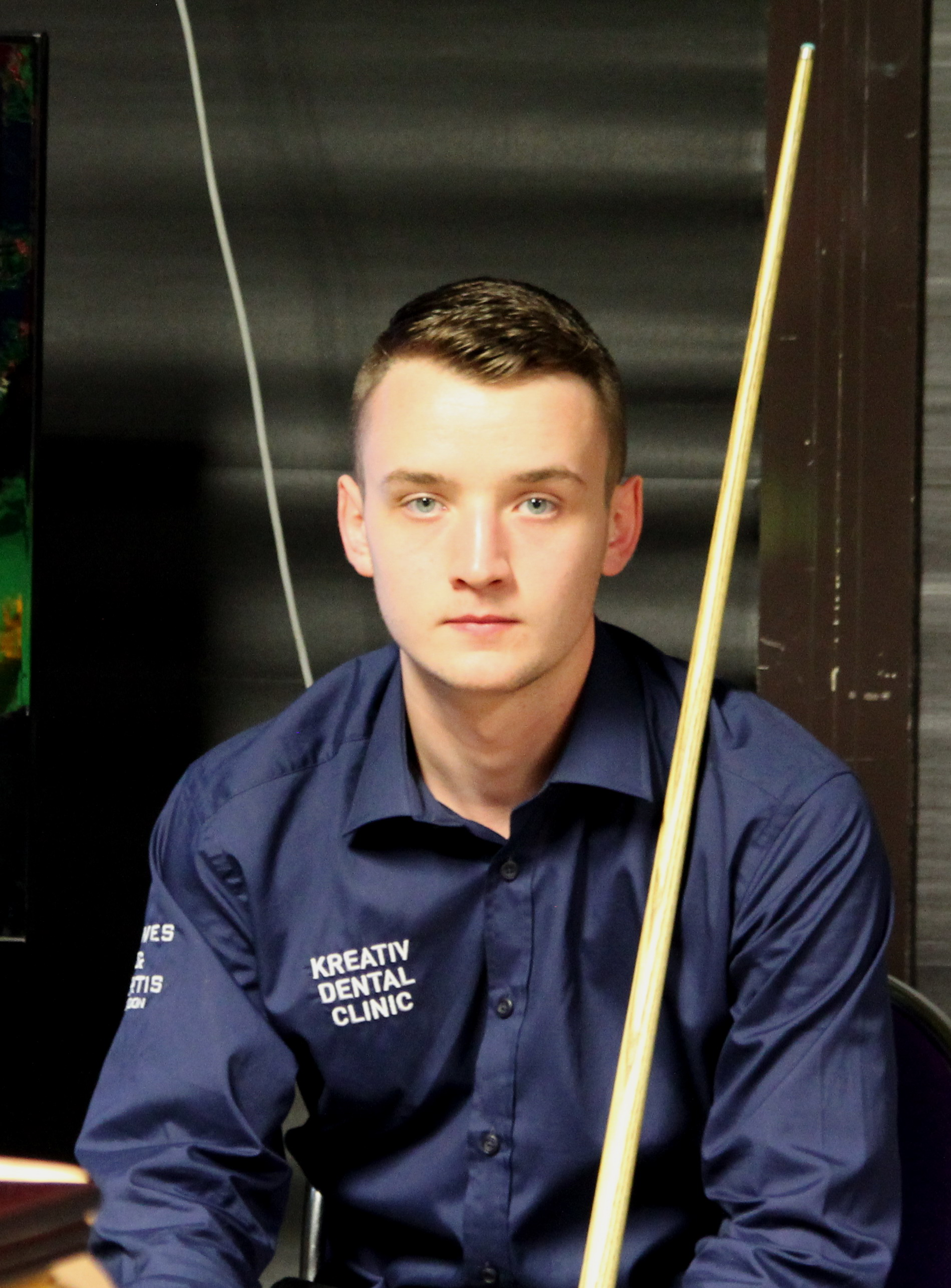 Sam Craigie beim Paul Hunter Classic 2015